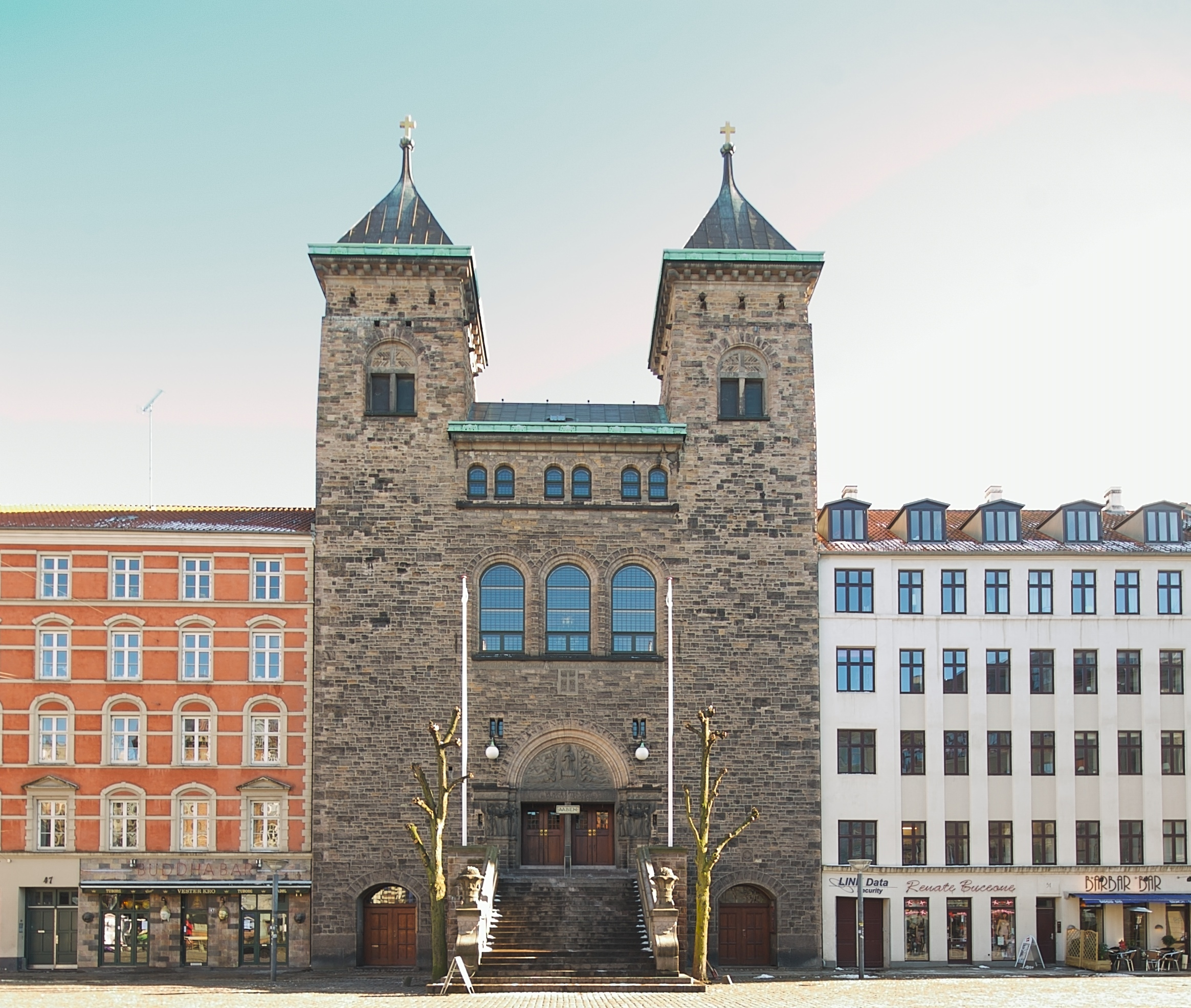 Eliaskirken, Vesterbro, Copenhagen, Denmark